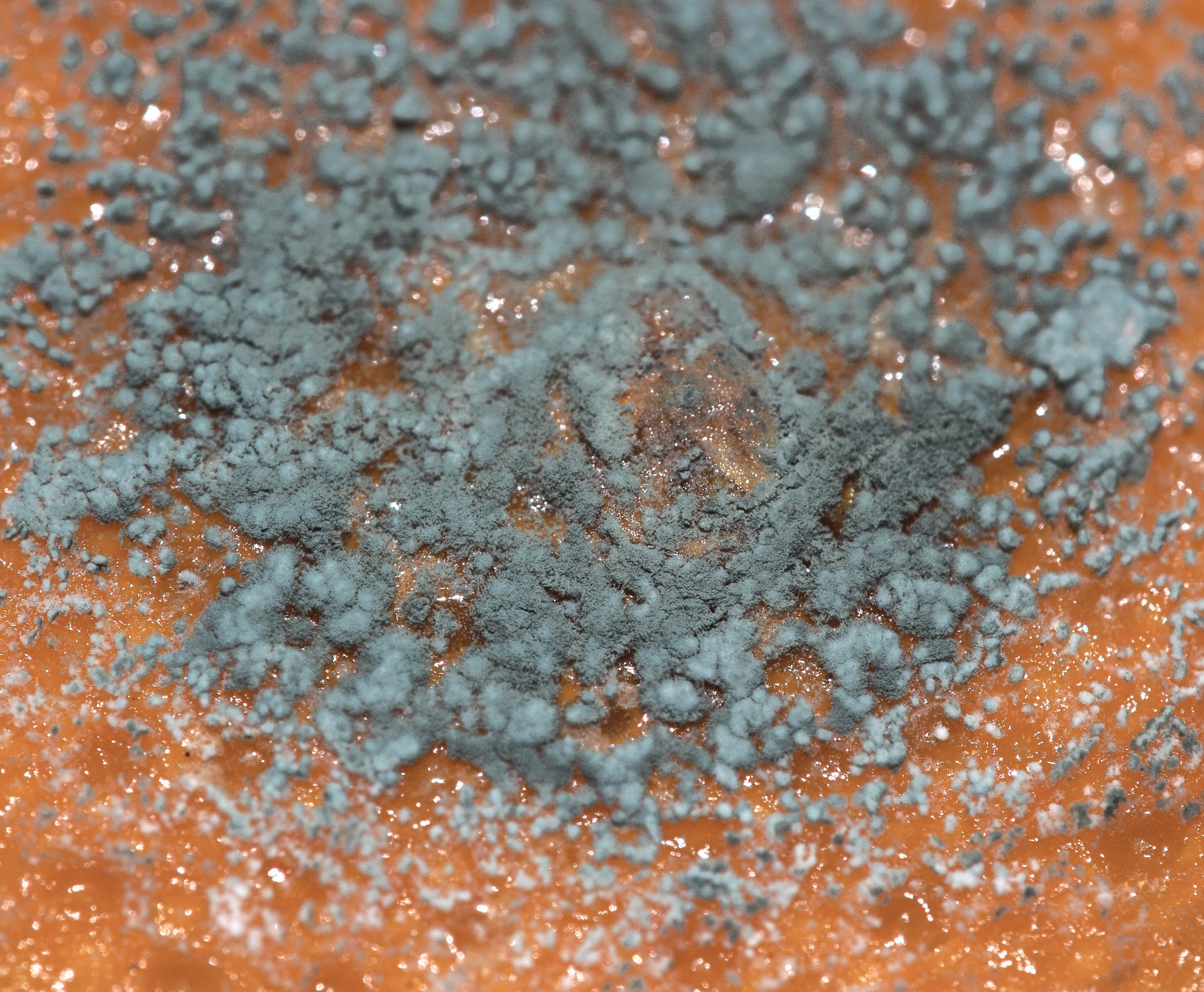 Penicillium sp. sobre naranja (Citrus aurantium).